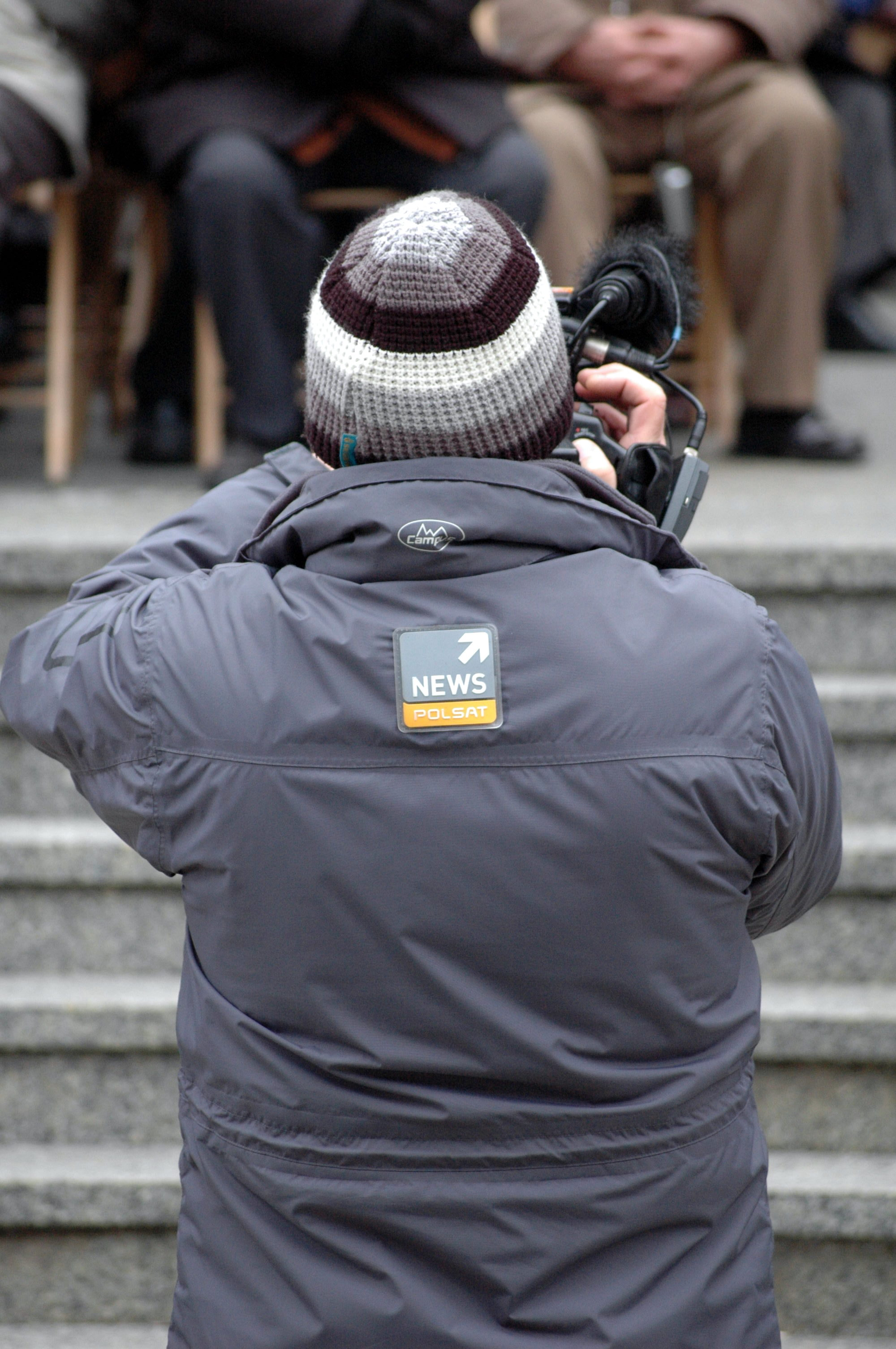 Dziennikarz Polsat News podczas pracy w Kołobrzegu